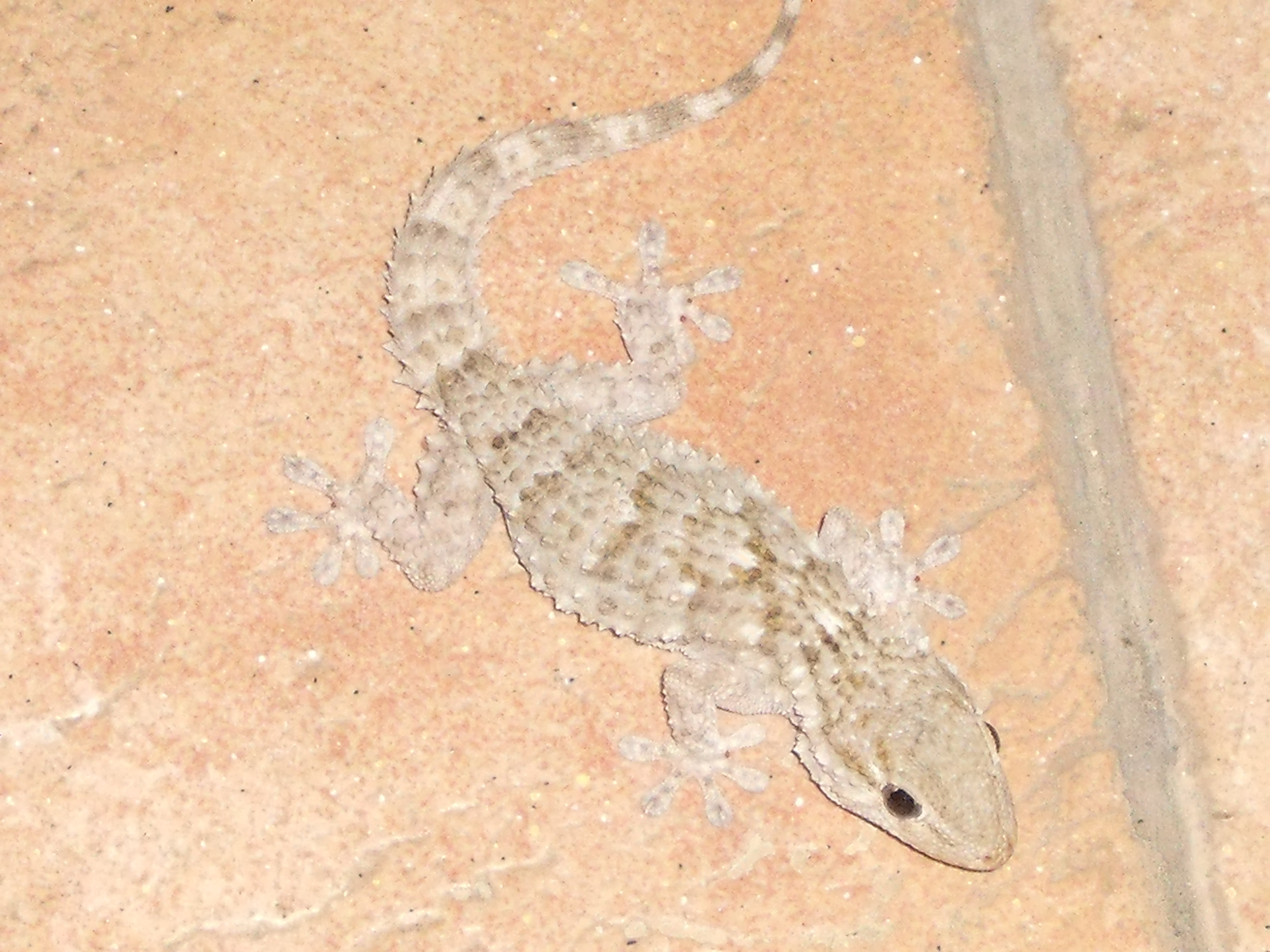 Tarentola mauretanica